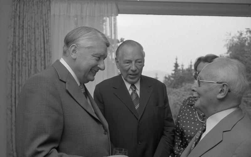 Bundesratsdirektor Dr. Albert Pfitzer gibt Empfang in seinem Haus in BN-Bad Godesberg (v.l.n.r: Lauritz Lauritzen, Helmut Lemke)